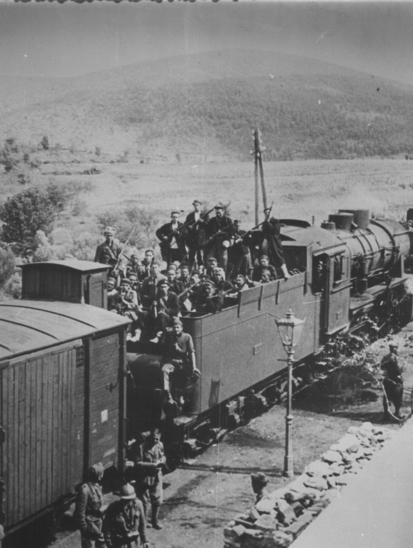 Srpskohrvatski / српскохрватски: Italijani i četnici u zajedničkom pohodu protiv partizana, u Kosovu kod Knina ljeti 1942.